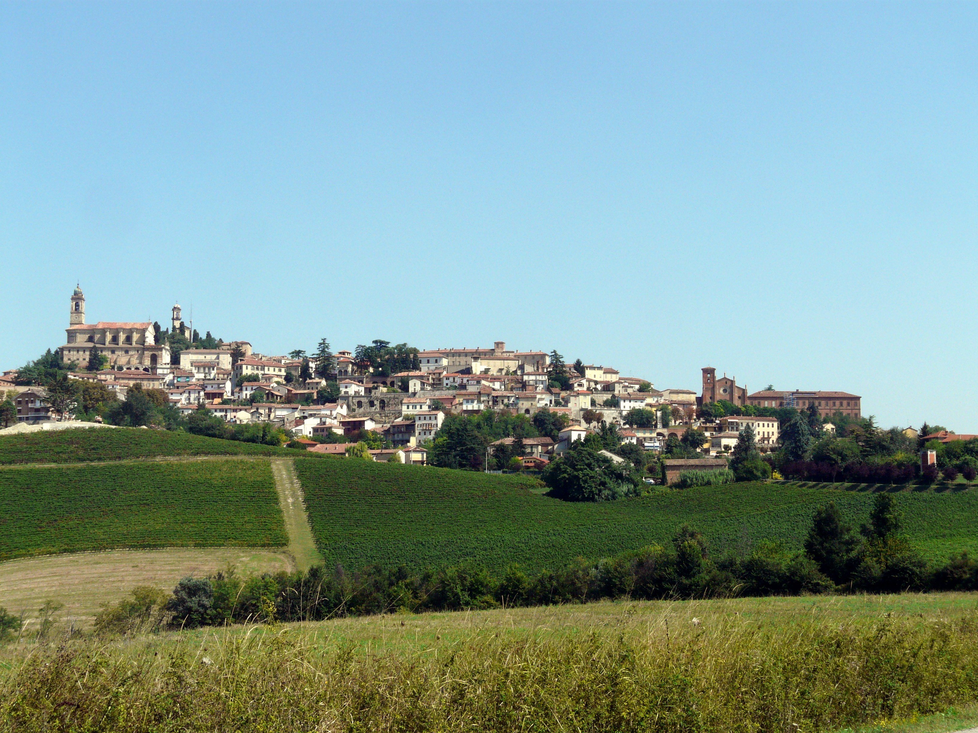 Vignale Monferrato, Piemonte, Italia